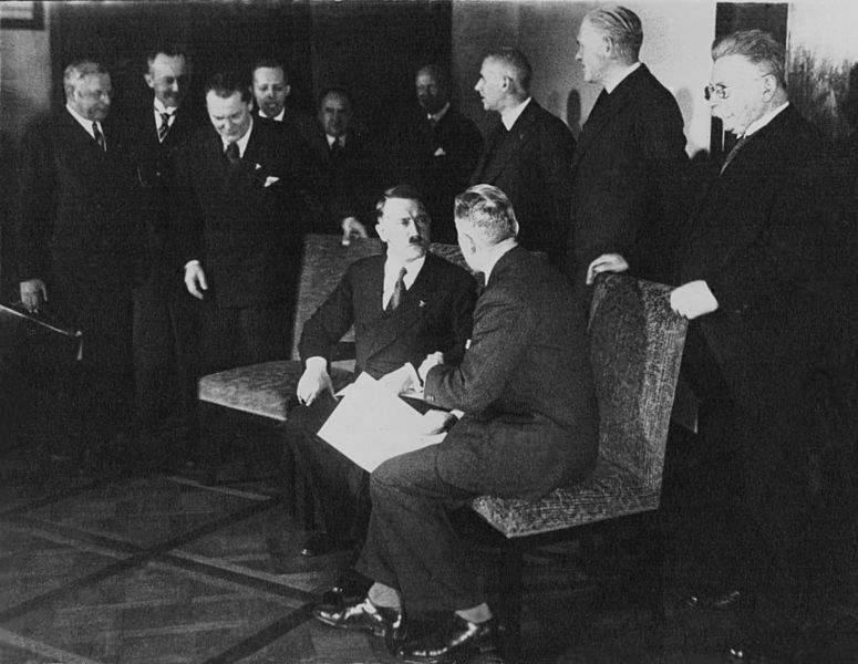 Adolfo Hitler y los miembros de su gobierno a comienzos de 1933.